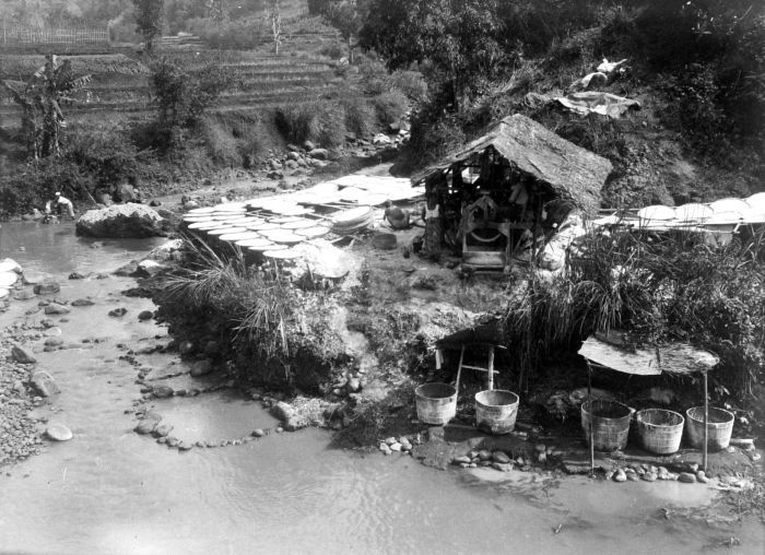 Repronegatief. Bereiding van bevolkingscassave nabij Malangbong, West-Java.